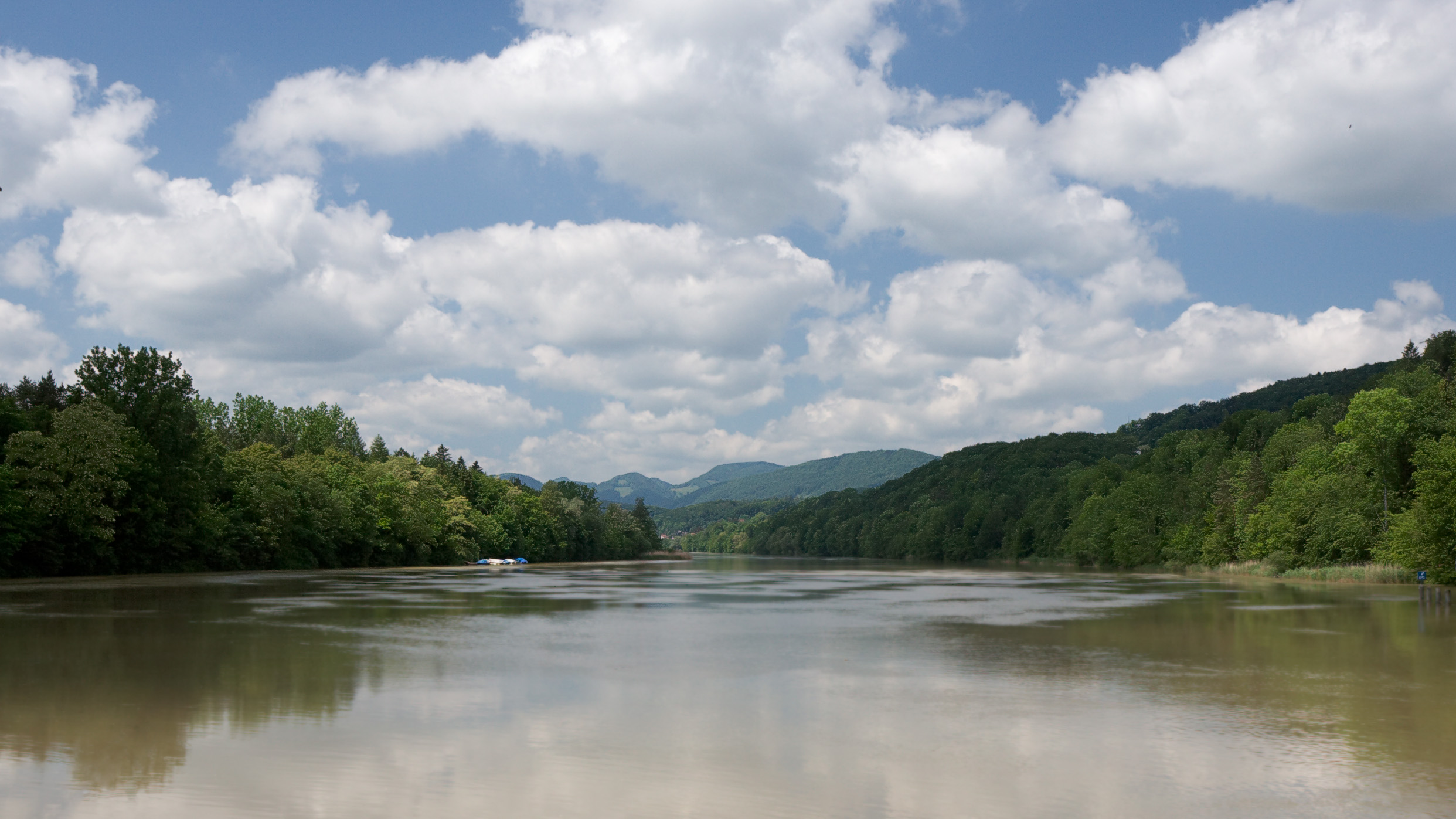 Die Aare bei Rupperswil, Aufnahme vom Kraftwerksdamm